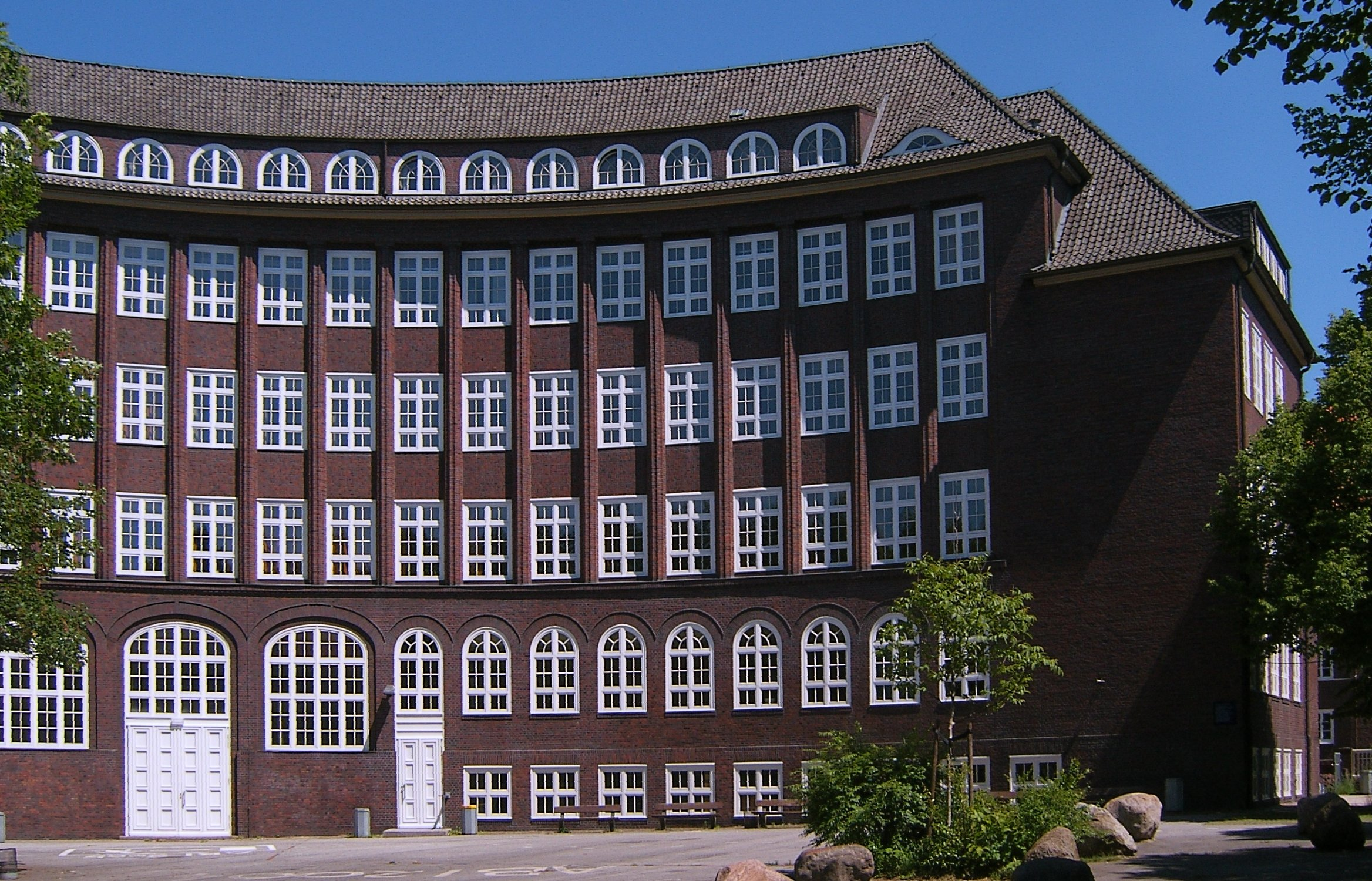 Das Emil-Krause-Gymnasium in der Krausestraße 53 auf dem Dulsberg wurde 1919-23 durch Fritz Schumacher als Volksschule Ahrensburger Weg erbaut. Mit seiner zum Schulhof hin gekrümmten Fassade stellt es den westlichen Eingang zum Stadtteil dar. Die Umbenennung von Schule und Straße erfolgte zu Ehren des Schulsenators und -reformers Emil Krause.This is a photograph of an architectural monument.